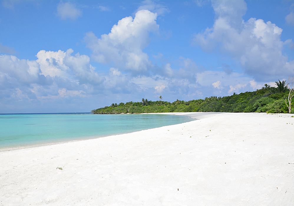 Hanimaadhoo Island, Haa Dhaalu Atoll, Malediven